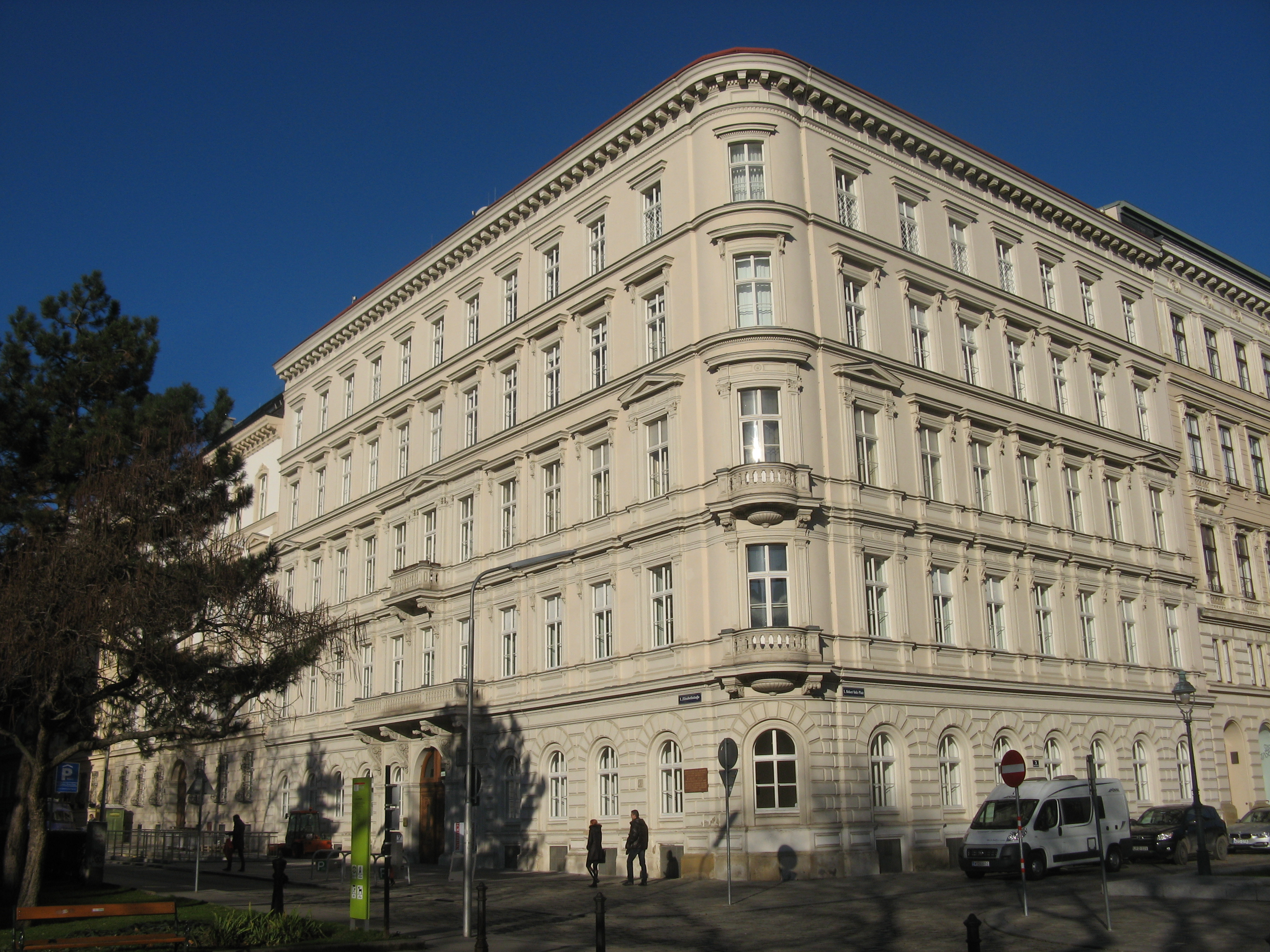 Elisabethstraße 16 (1865) von Carl Schumann, Wien-Innere Stadt